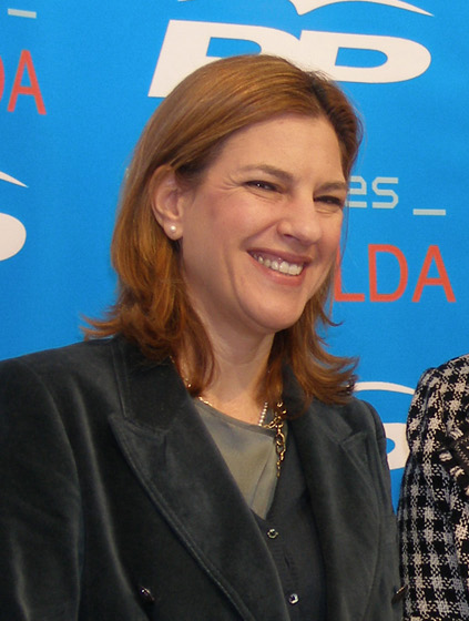 Paula Sánchez de León se reúne en Novelda. 28 Febrero 2011